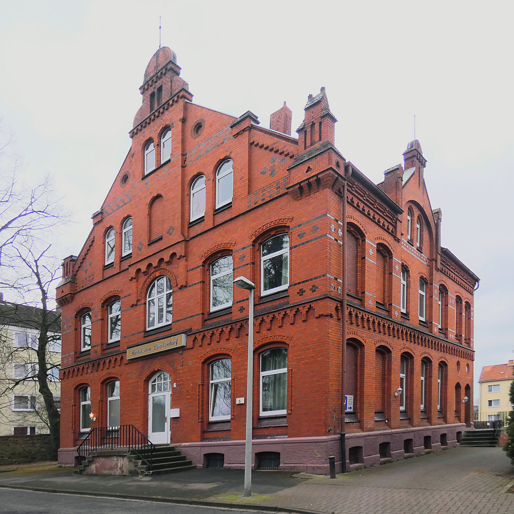 Das Baudenkmal Hotel am Lindenhof im hannoverschen Stadtteil Bornum